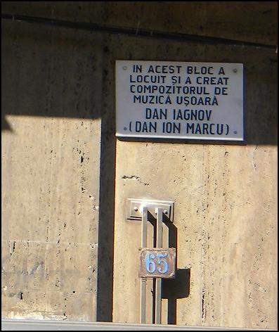 Tabletă comemorativă pe faţada blocului din strada Dionisie Lupu nr. 65, București.